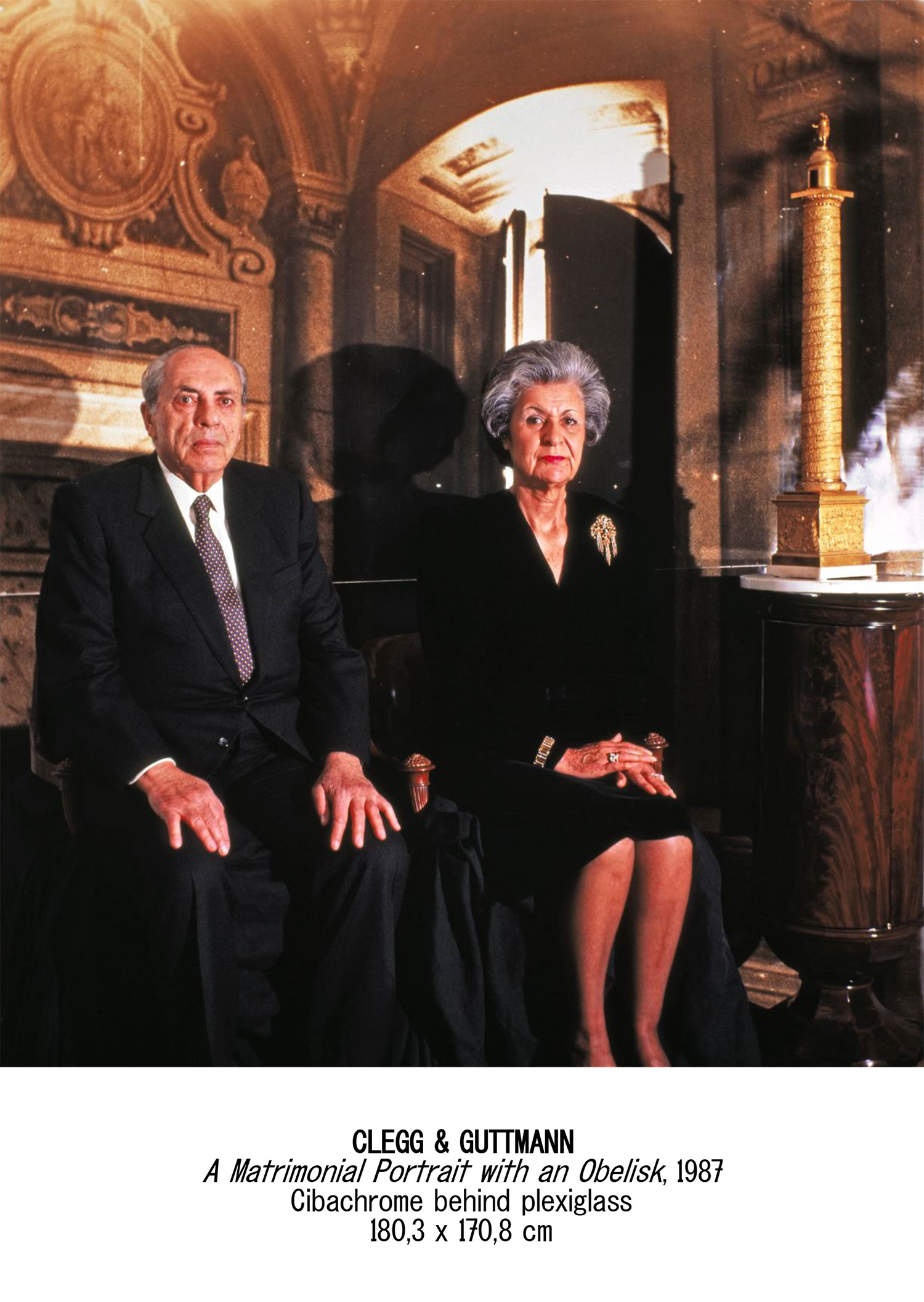 CLEGG&GUTTMANN MATRIMONIAL-PORTRAIT